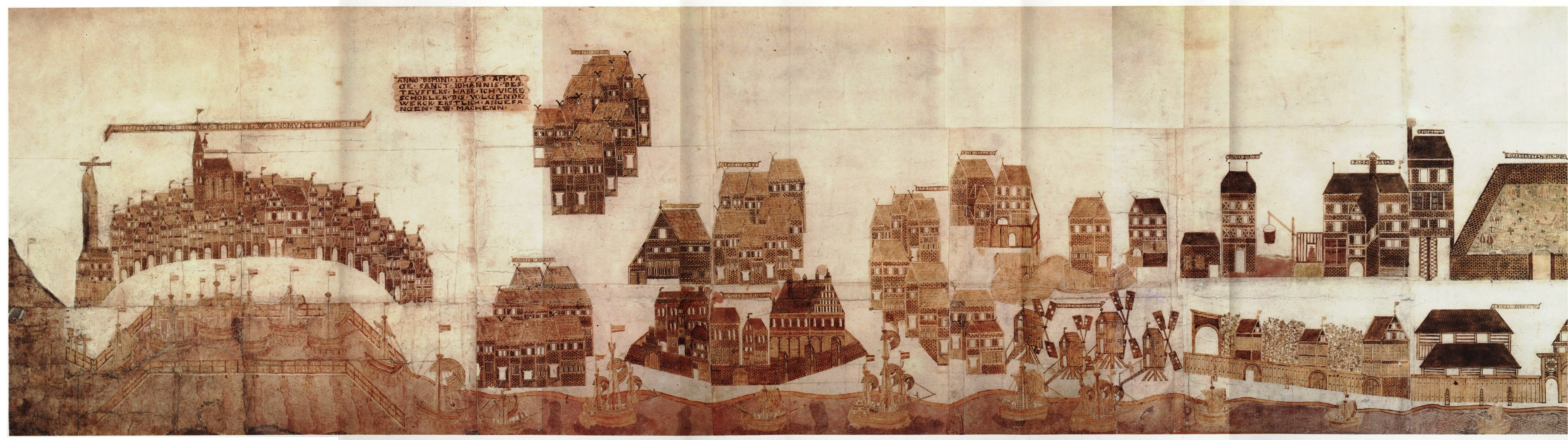 Vicke Schorler Rolle. Blatt 1/9